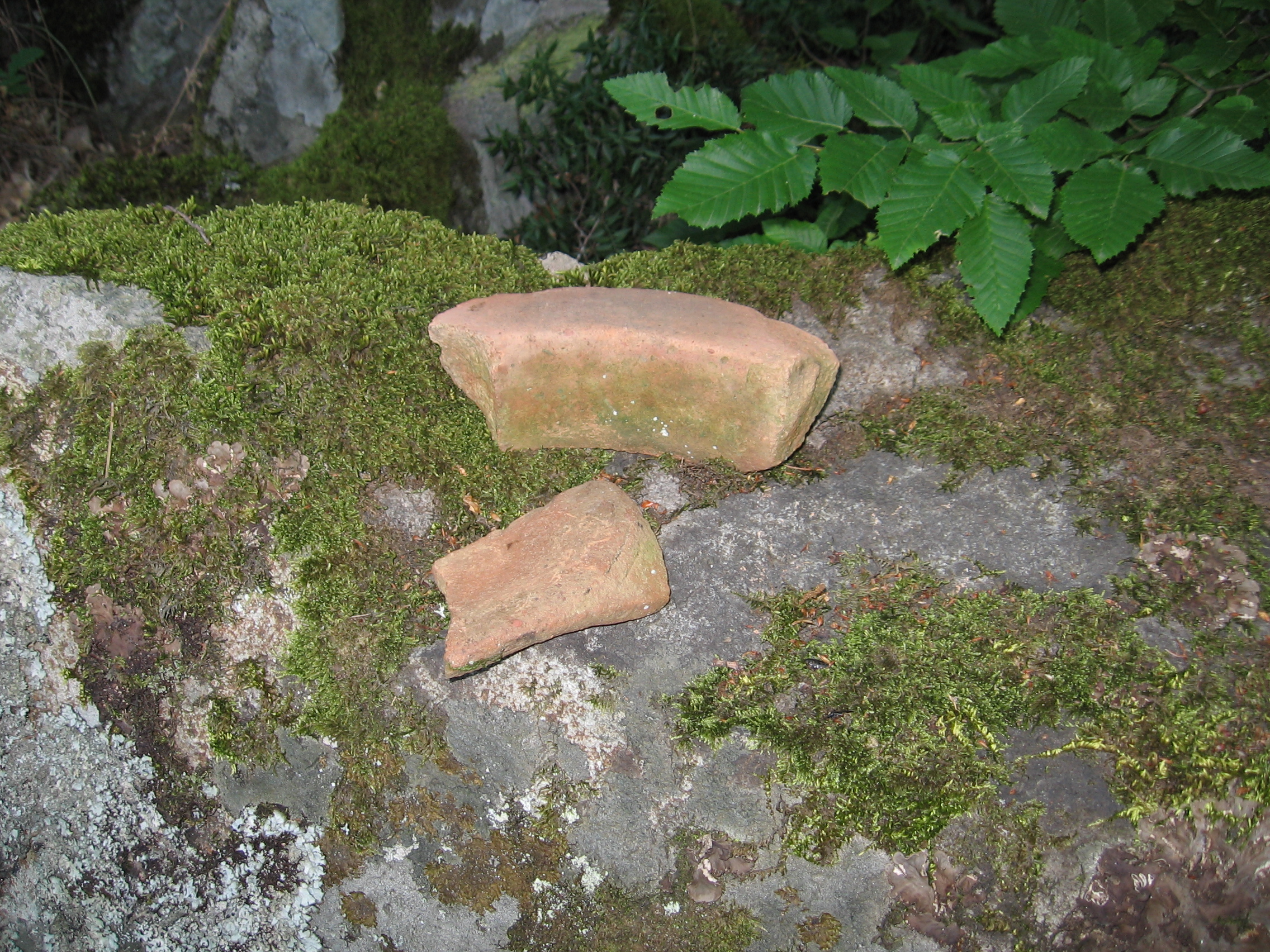 Фото